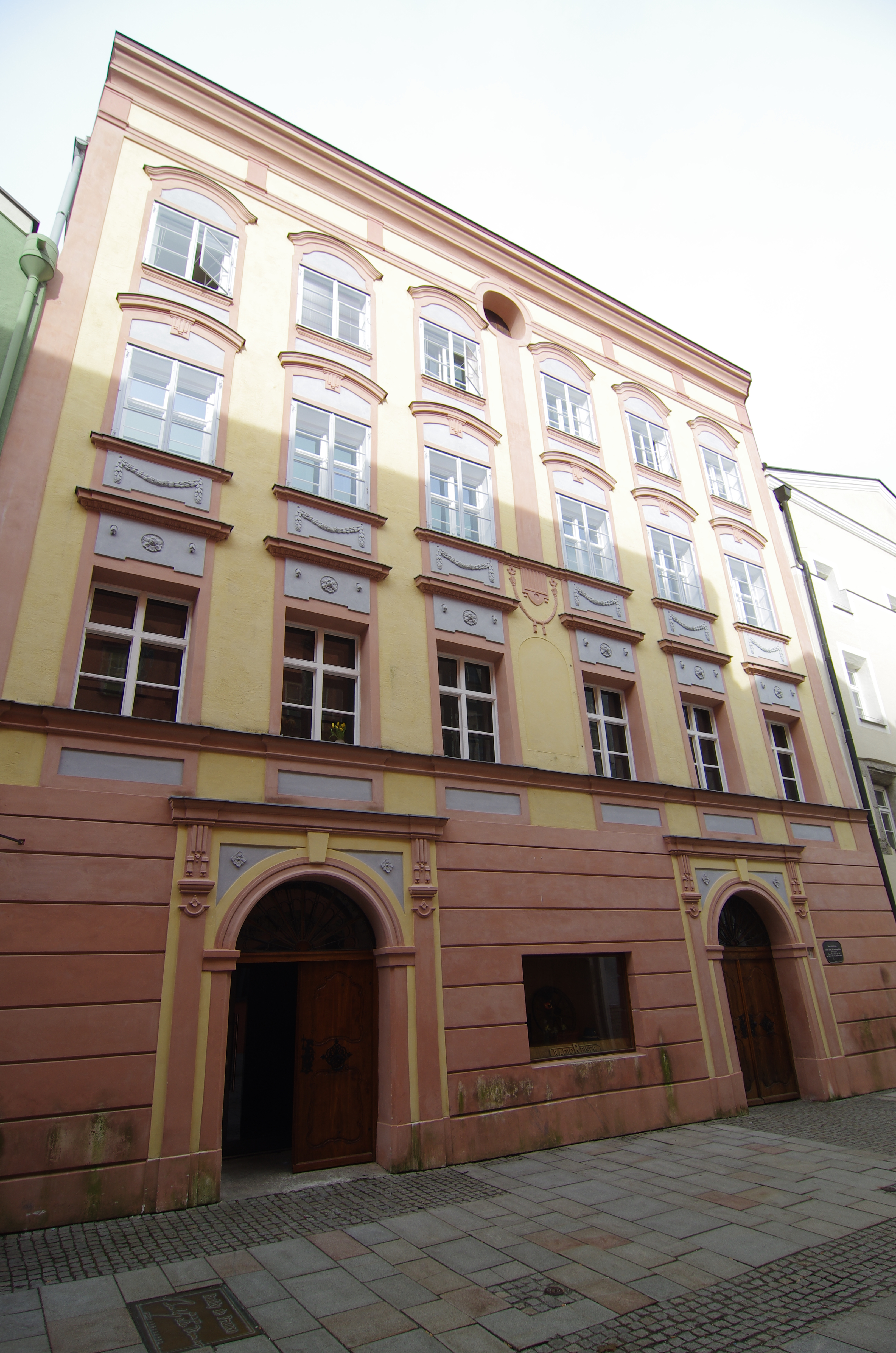 Baumeisterhaus mit wiederhergestellter "Glonner-Fassade" nach der Renovierung in den 2010-er JahrenThis is a photograph of an architectural monument.